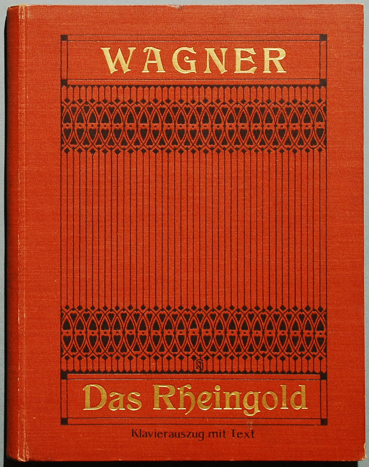 Wagner, Richard: Das Rheingold. Vollständiger Klavierauszug von Karl Klindworth. Mainz Leipzig London Brüssel Paris: Schott’s Söhne [um 1900], 233 Seiten. Original-Leinen mit Schwarz- und Goldprägung Lex. 8° (29 x 23 cm).